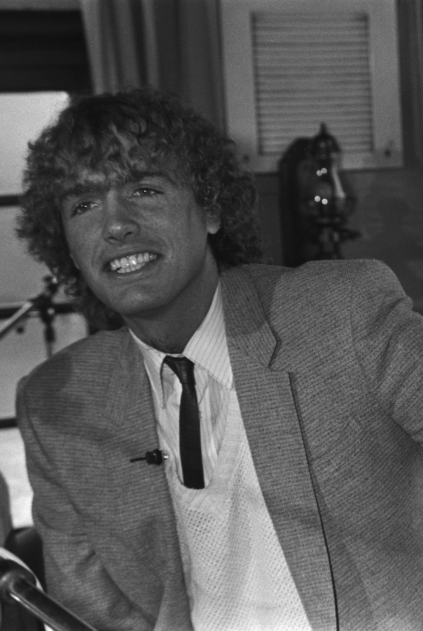 Diverse Nederlandse artiesten maken hun opwachting in het radioprogramma Open House. Bolland & Bolland